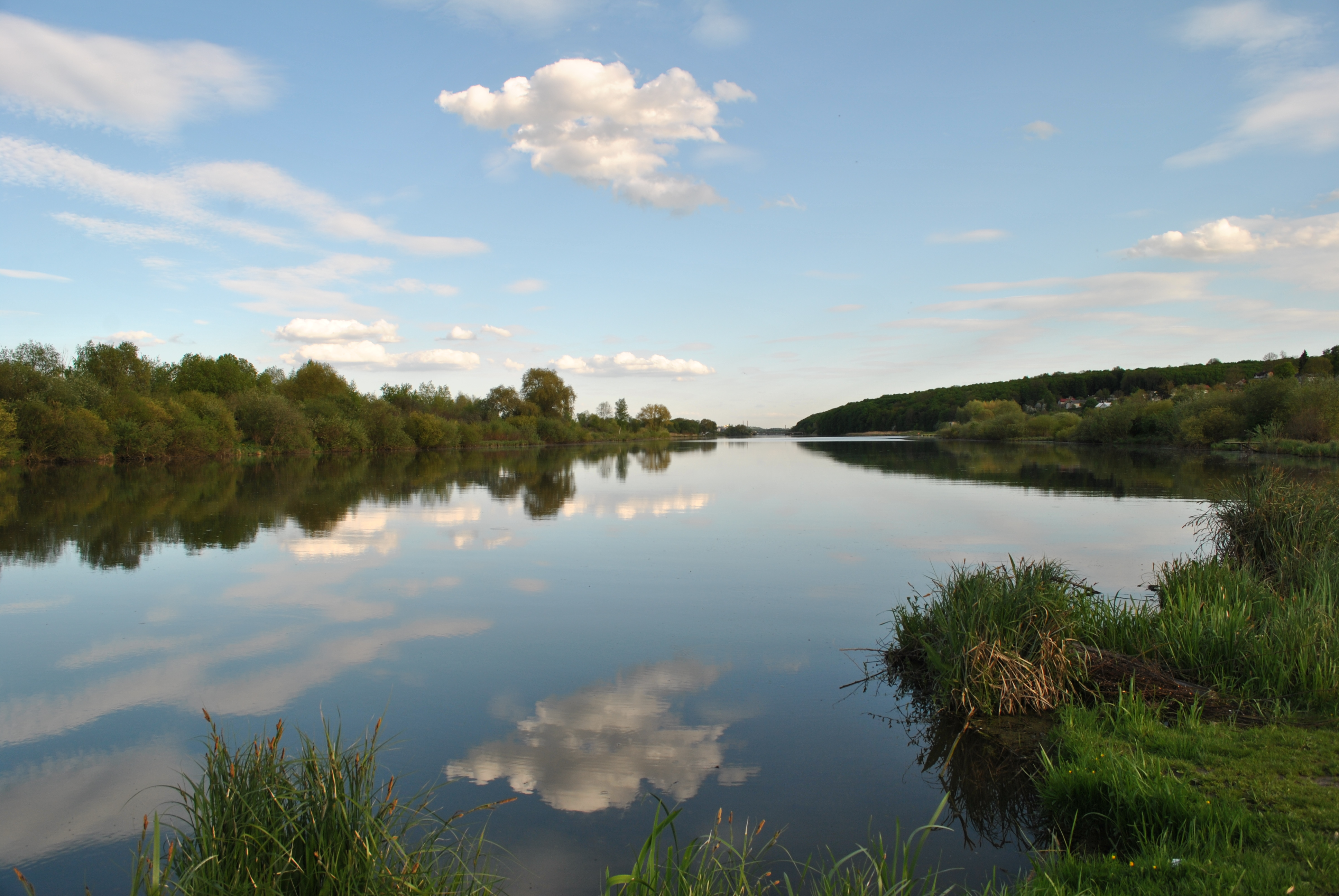 Веслувальний канал Тернопільського ставу в регіональному ландшафтному парку «Загребелля» м. Тернополя.